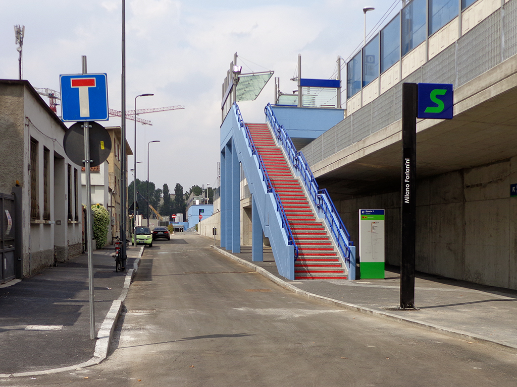 Stazione ferroviaria di Milano Forlanini, la scala d’accesso lungo via Ardigò.